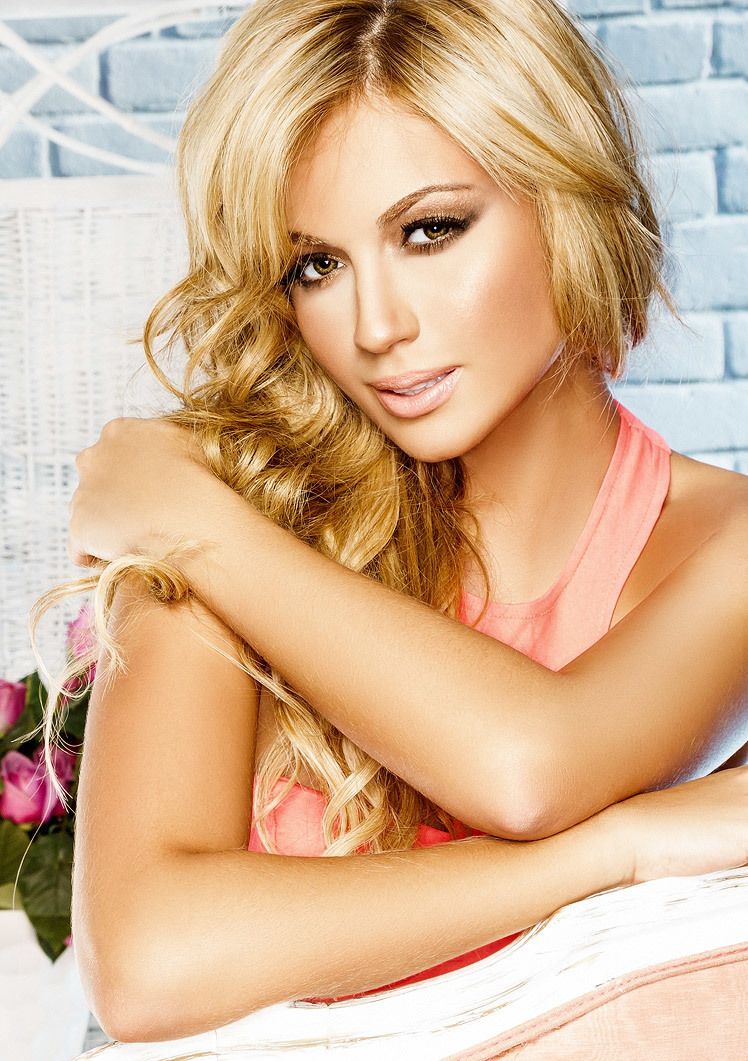 Fotografía: Modelo: Sara Uribe PostProducción: Santiago Castaño Retoque